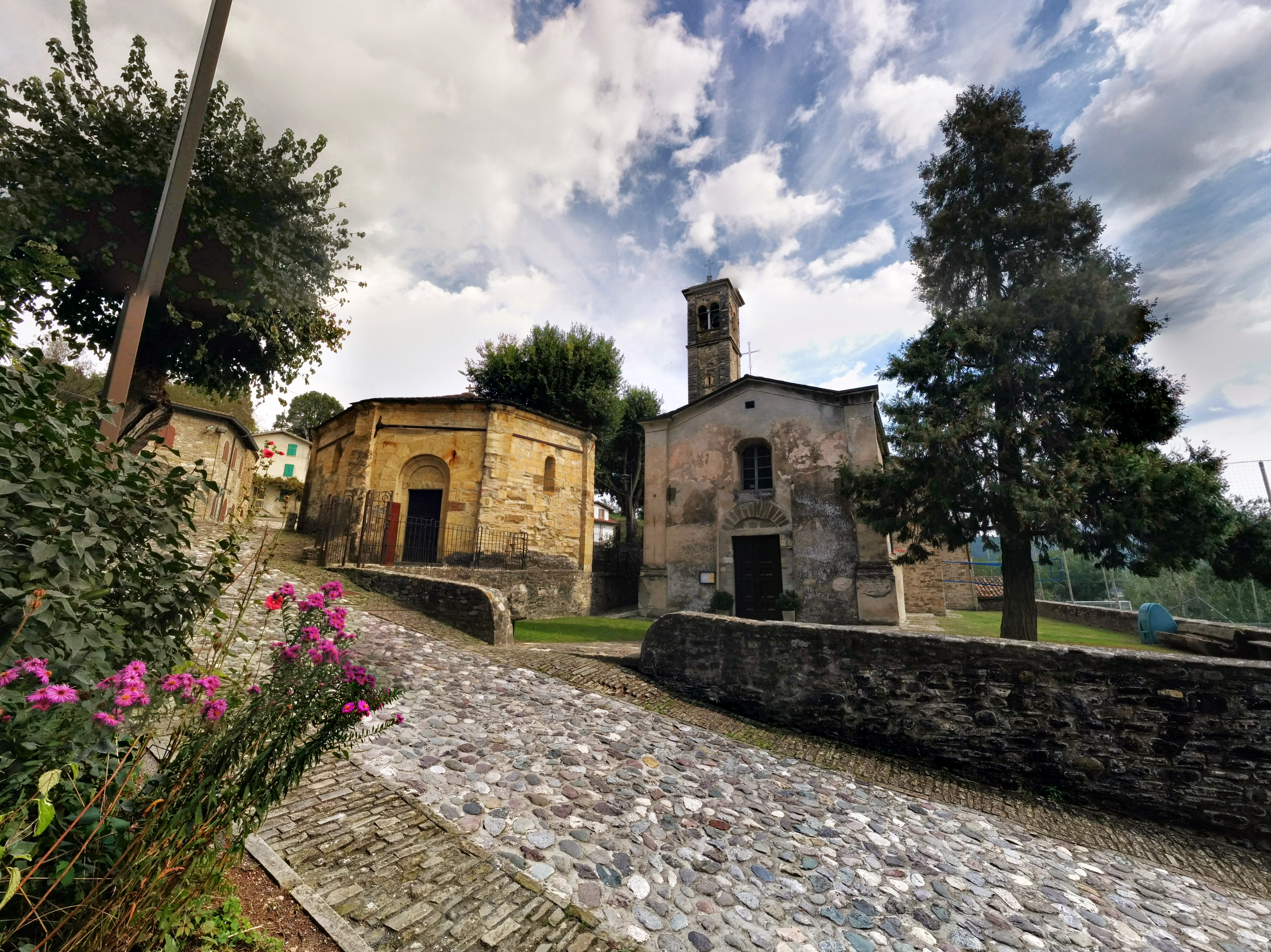 Battistero This is a photo of a monument which is part of cultural heritage of Italy.